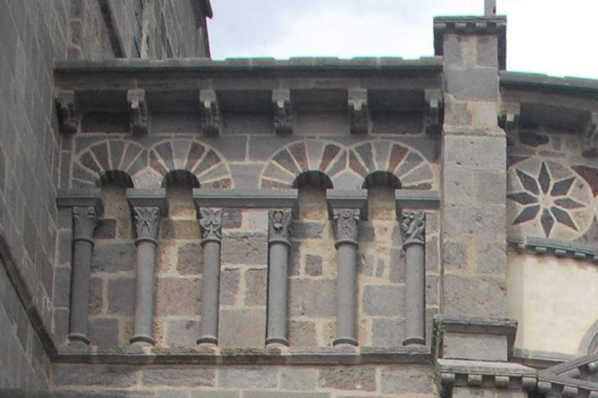 St.-Nectaire, Arkatur Chorjoch von S